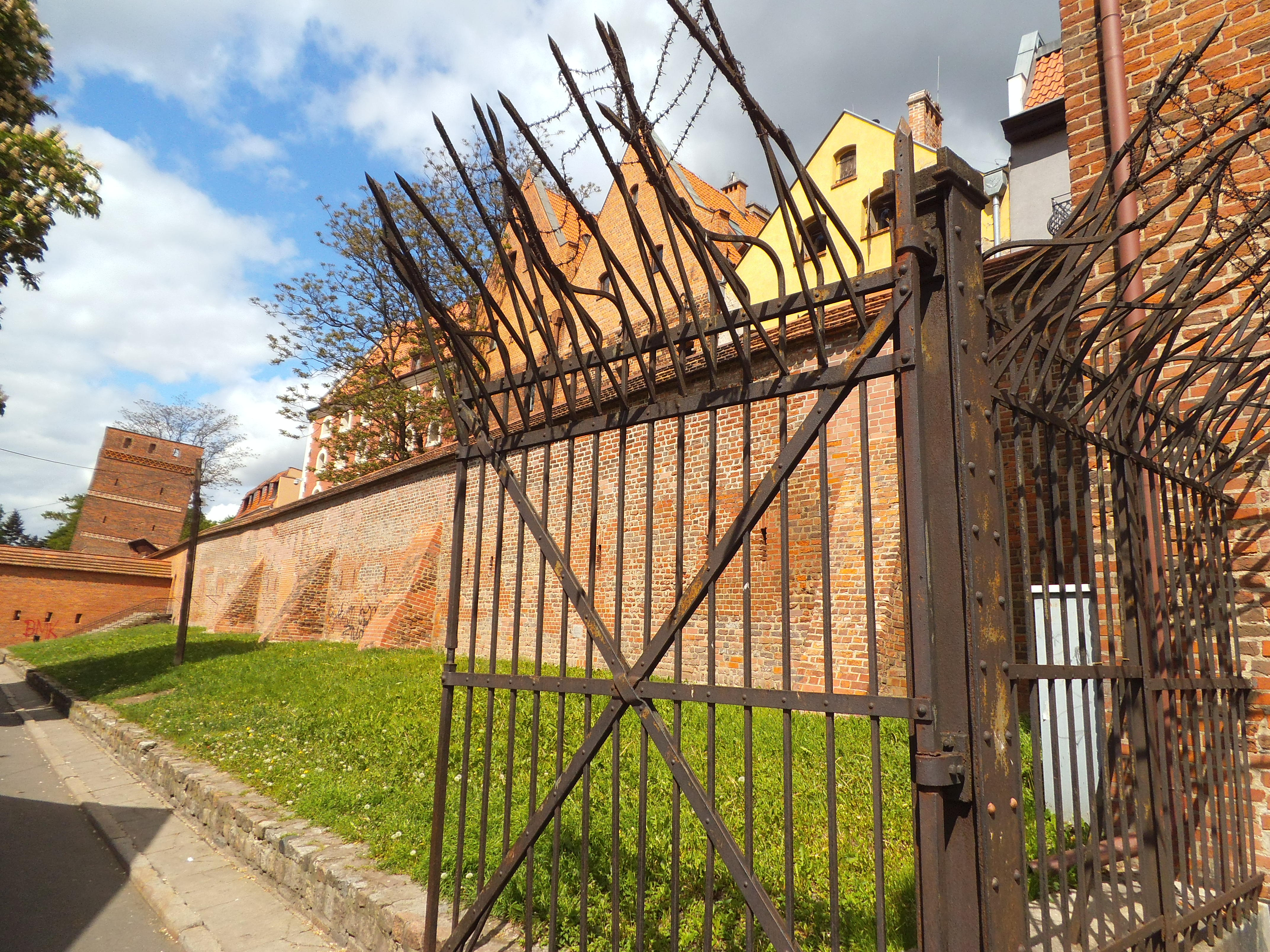 Mury Starego Miasta w Toruniu